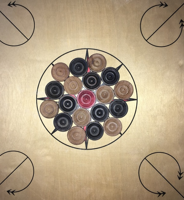 Disposition des pions dans la rosace (cercle noir) en début de partie.